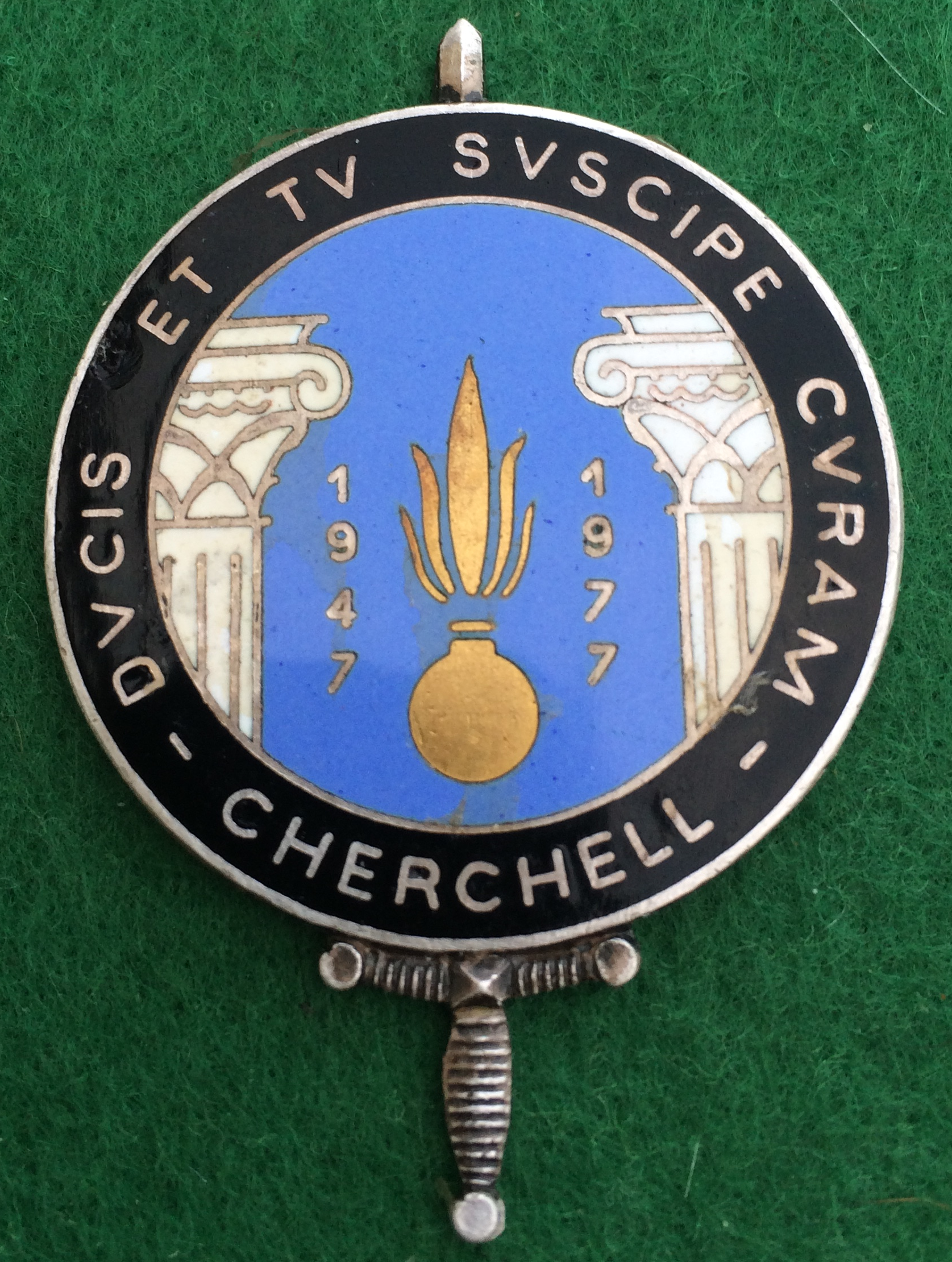 Insigne de la promotion EOR du 3e bataillon de l'ESM Saint-Cyr Coëtquidan de 1977 "Souvenir de Cherchell" marquant le 30e anniversaire du début de la formation unifiée des EOR affectés en Afrique du Nord à l'école militaire de l'infanterie de Cherchell (Algérie). À cet effet, l'insigne de l'école, au centre, comporte les dates "1947" et "1977"; il est entouré de la devise de l'école « DVCIS ET TV SVSCIPE CVRAM » (Assume toi aussi la charge du commandement) ; l'épée, symbolise l'école d'officiers (Fraisse - Paris). L'insigne fut réédité au profit de la même formation EOR de Saint-Cyr, pour la promotion de 1982 "Cherchell", cette fois-ci à l'occasion du 40e anniversaire du début de cette formation d'officiers dans cette école en 1942 (École des élèves aspirants).